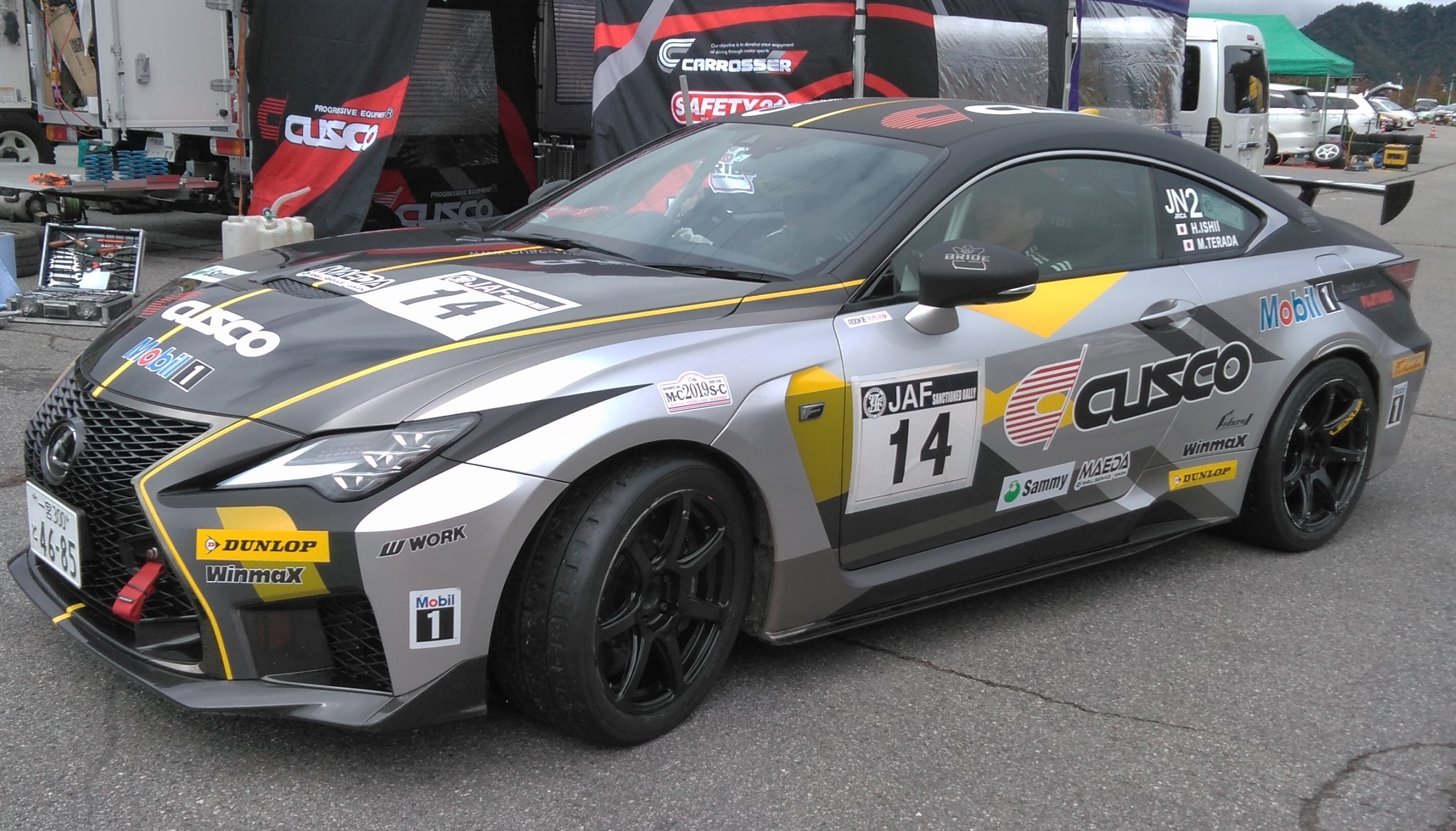 全日本ラリー選手権に参戦するクスコ・レーシングのレクサス・RC F